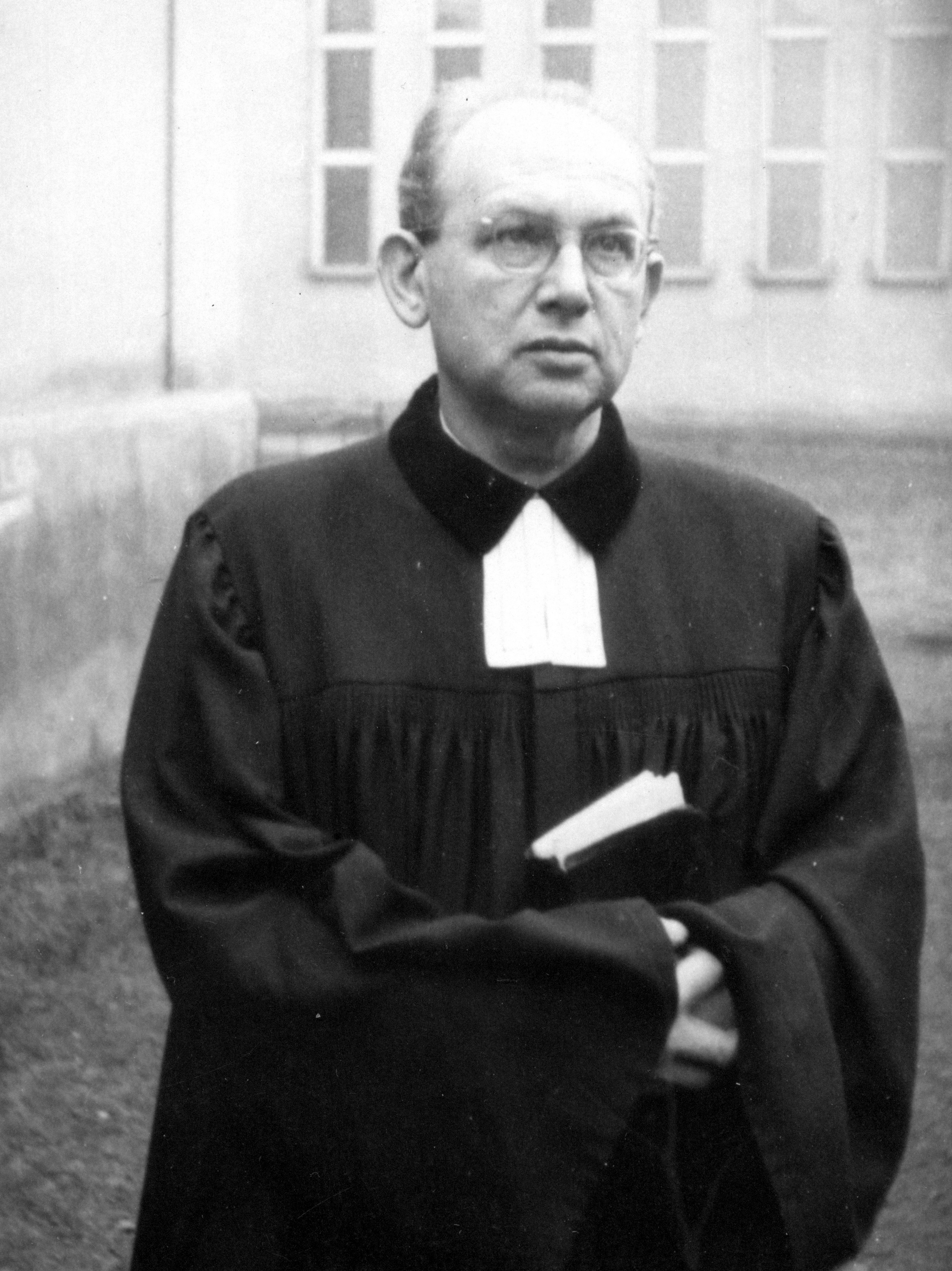 Antonín Venc